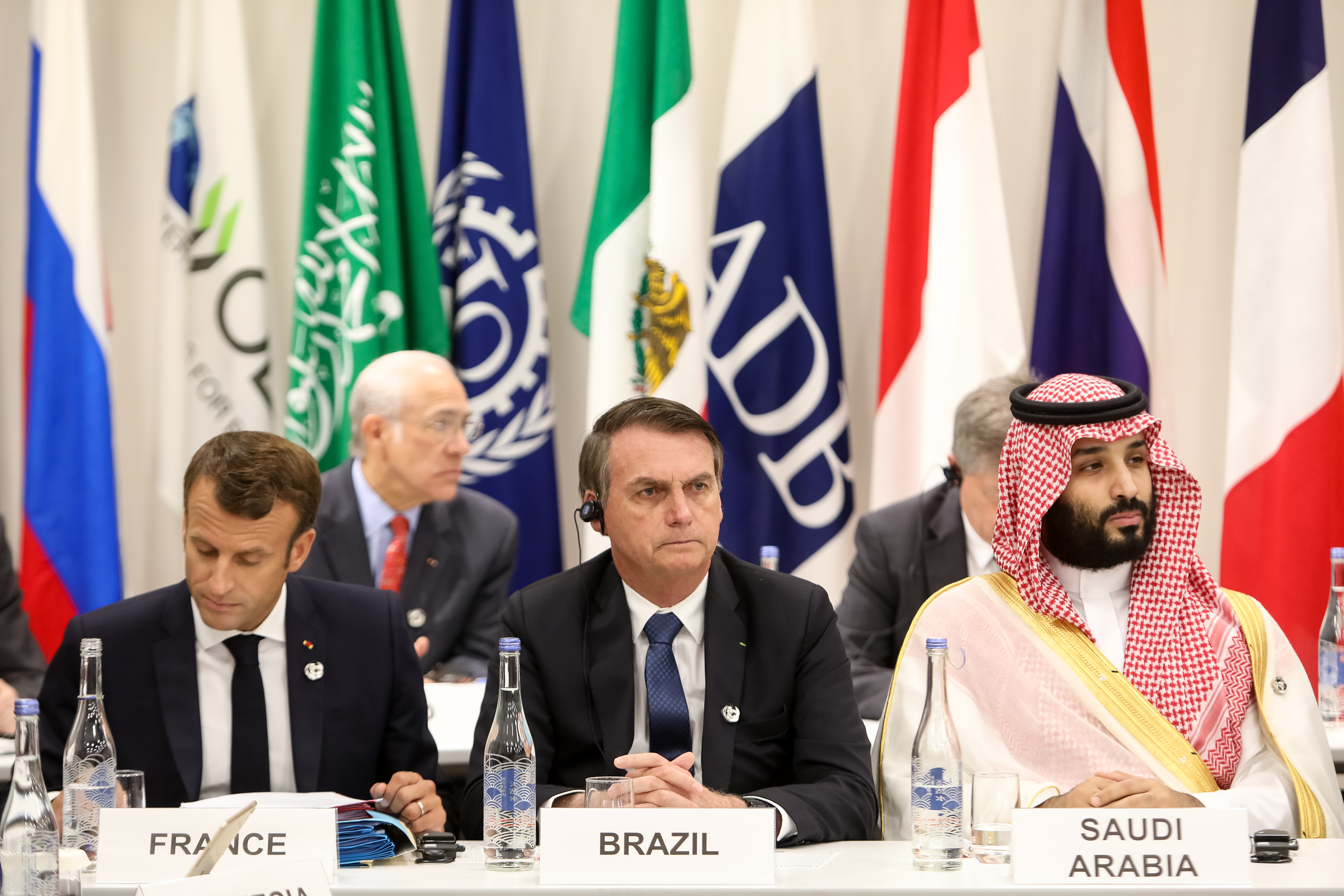 (Osaka - Japão, 28/06/2019) Presidente da República, Jair Bolsonaro, durante Reunião Paralela dos Líderes do G20, sobre Economia Digital. Foto: Clauber Cleber Caetano/PR